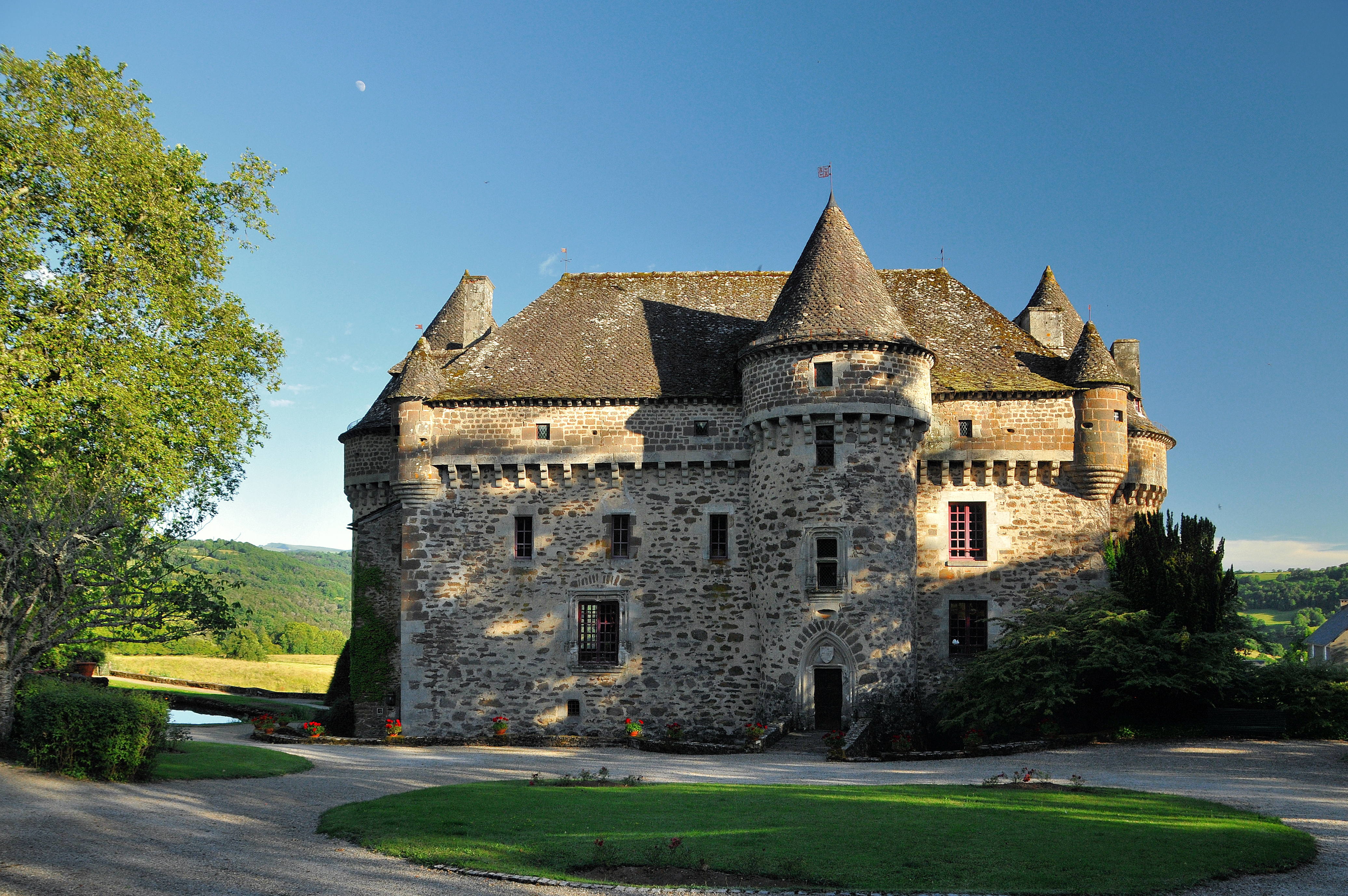 Le château d'Auzers, le soir en été.